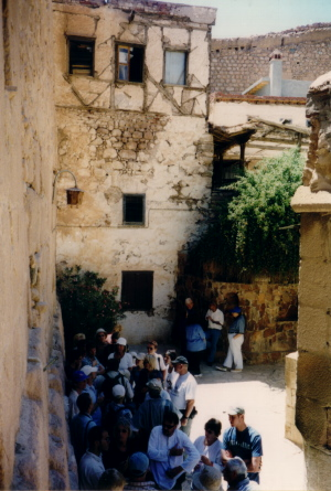 Katharinenkloster, Ägypten 2003 yak 12:18, 4. Mai 2006 (CEST)